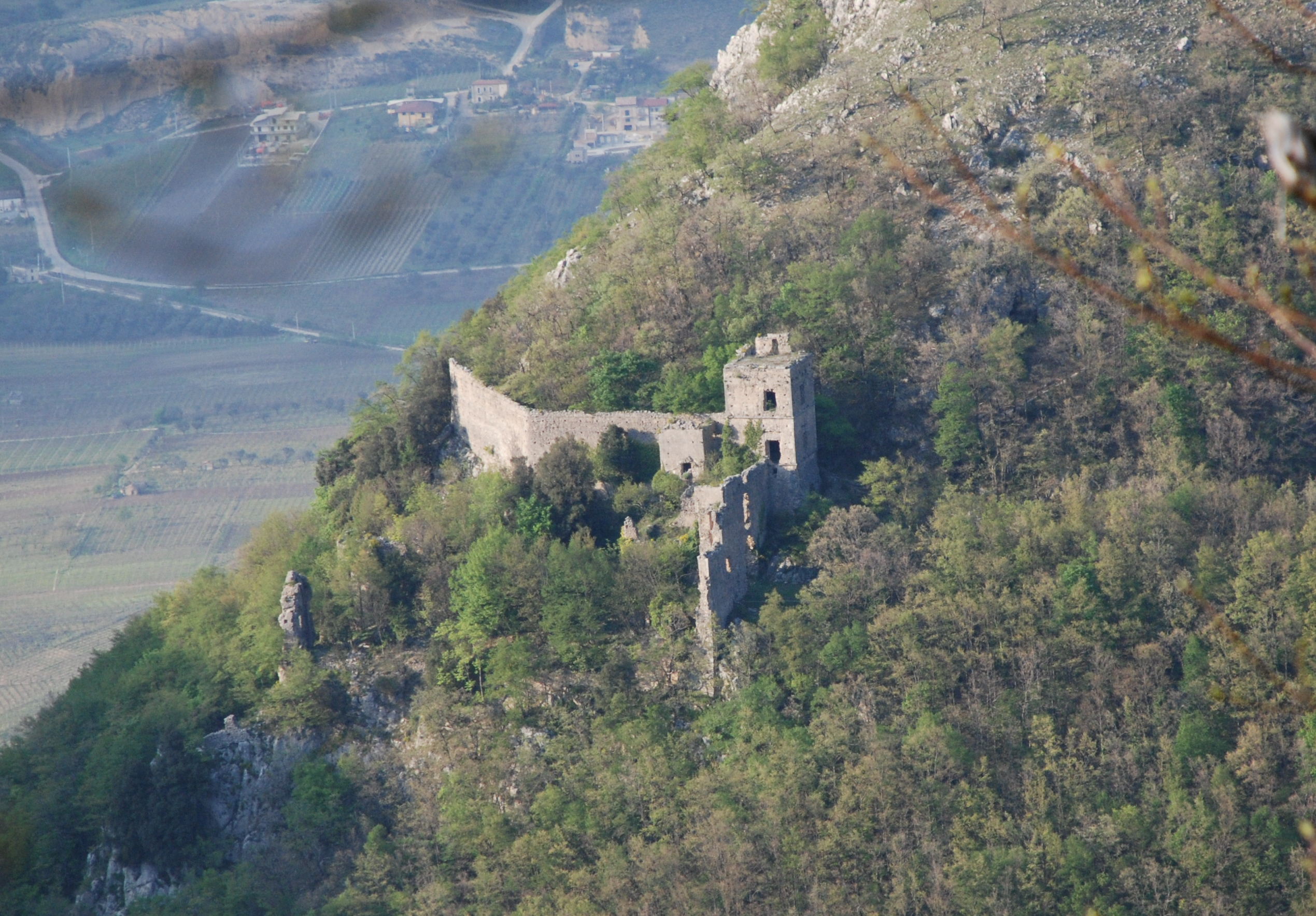 Vista del monastero abbandonato di S. Maria in Gruptis, Vitulano (BN)